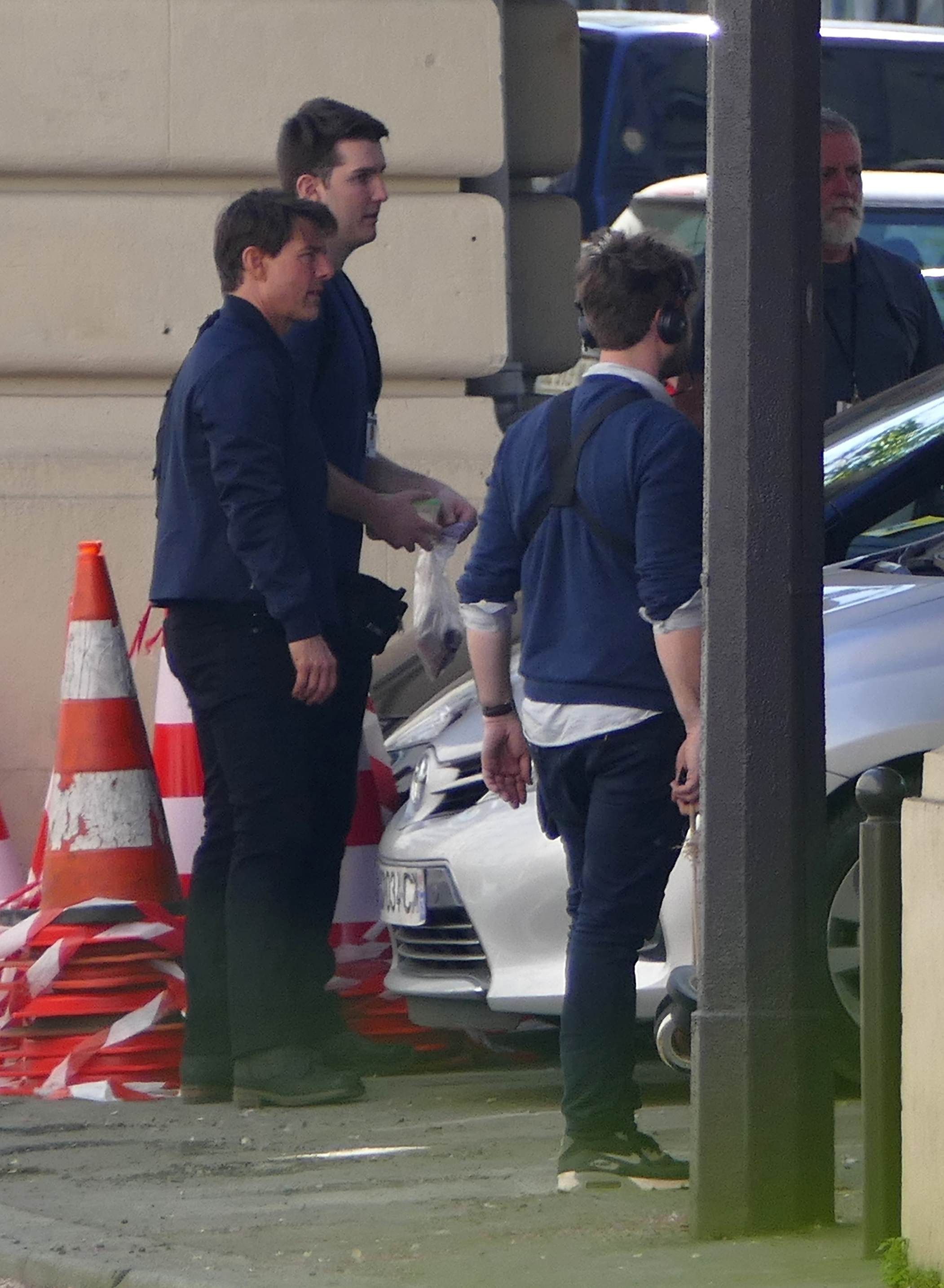 Tom Cruise sur le tournage de Mission Impossible 6 à Paris, boulevard Garibaldi, 9 avril 2017.